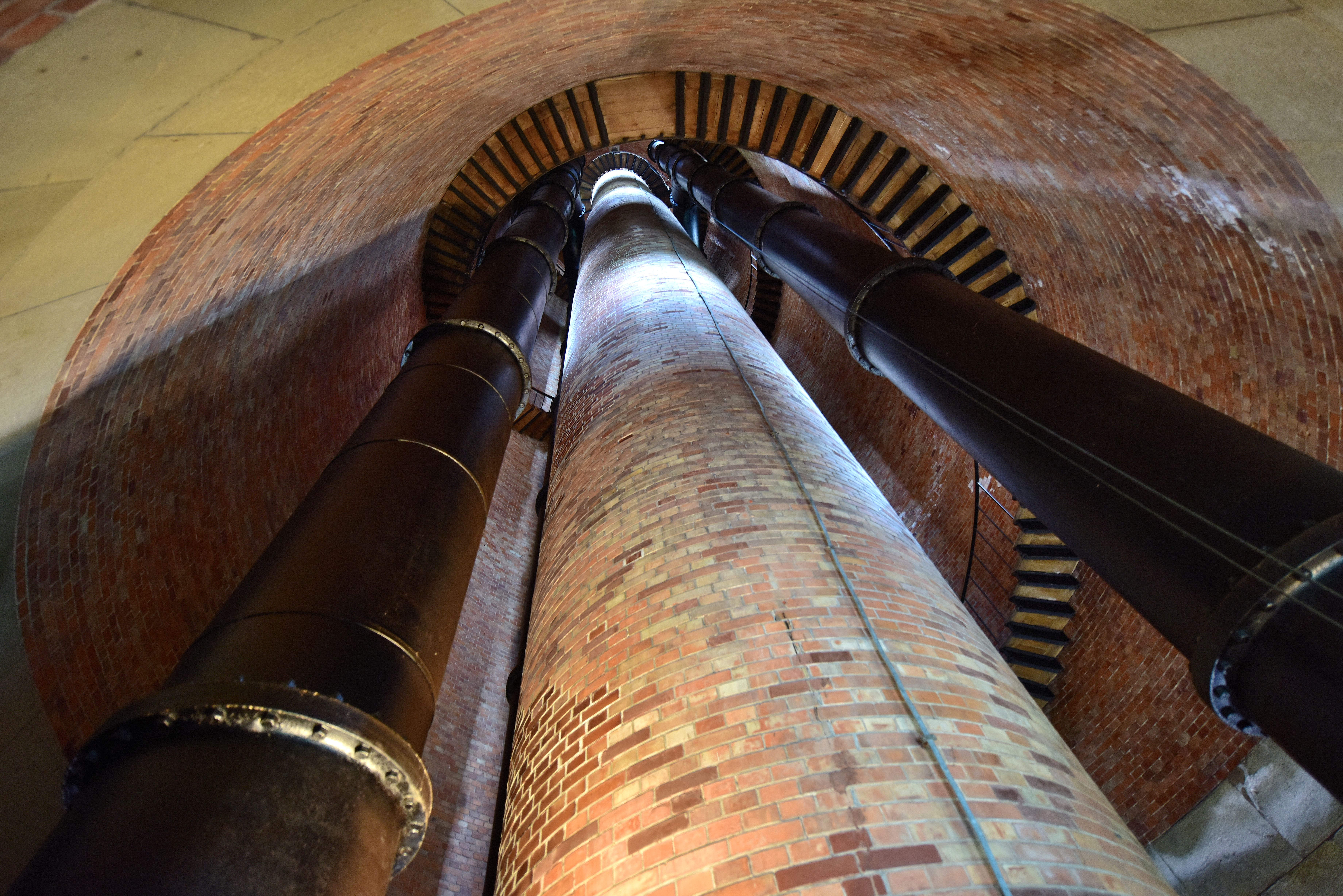 Zespół Stacji Filtrów przy ul. Koszykowej 81 w Warszawie. Wnętrze wieży cisnień